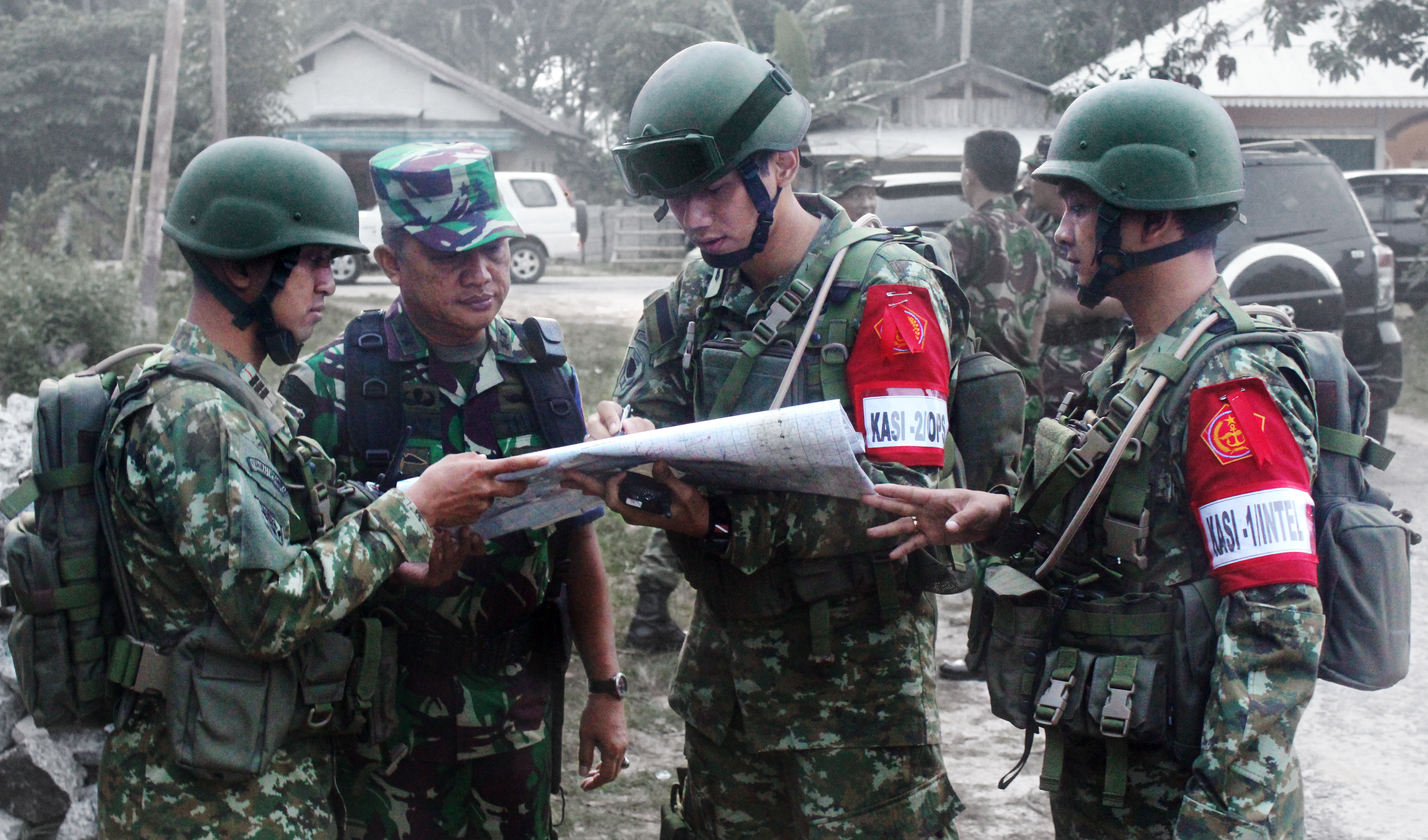 AHY penugasan Militer